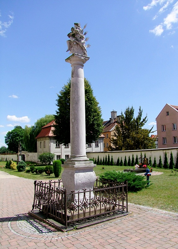 Nowogrodziec - kolumna maryjna przed kościołem p.w. śś. Piotra i Pawła